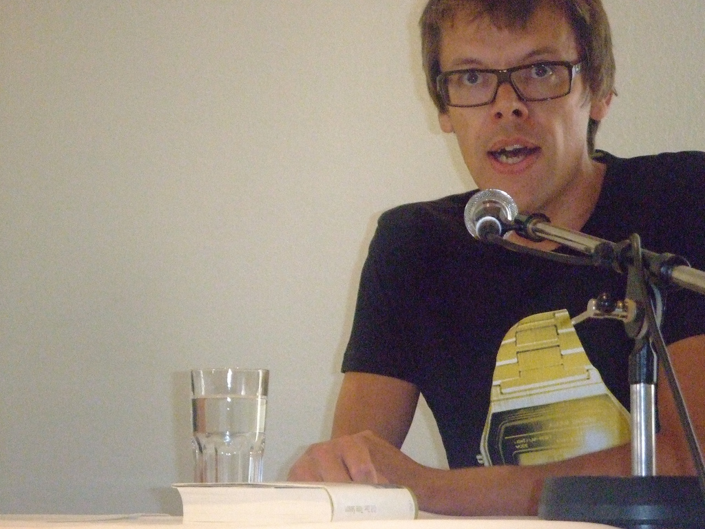 Markus köhle